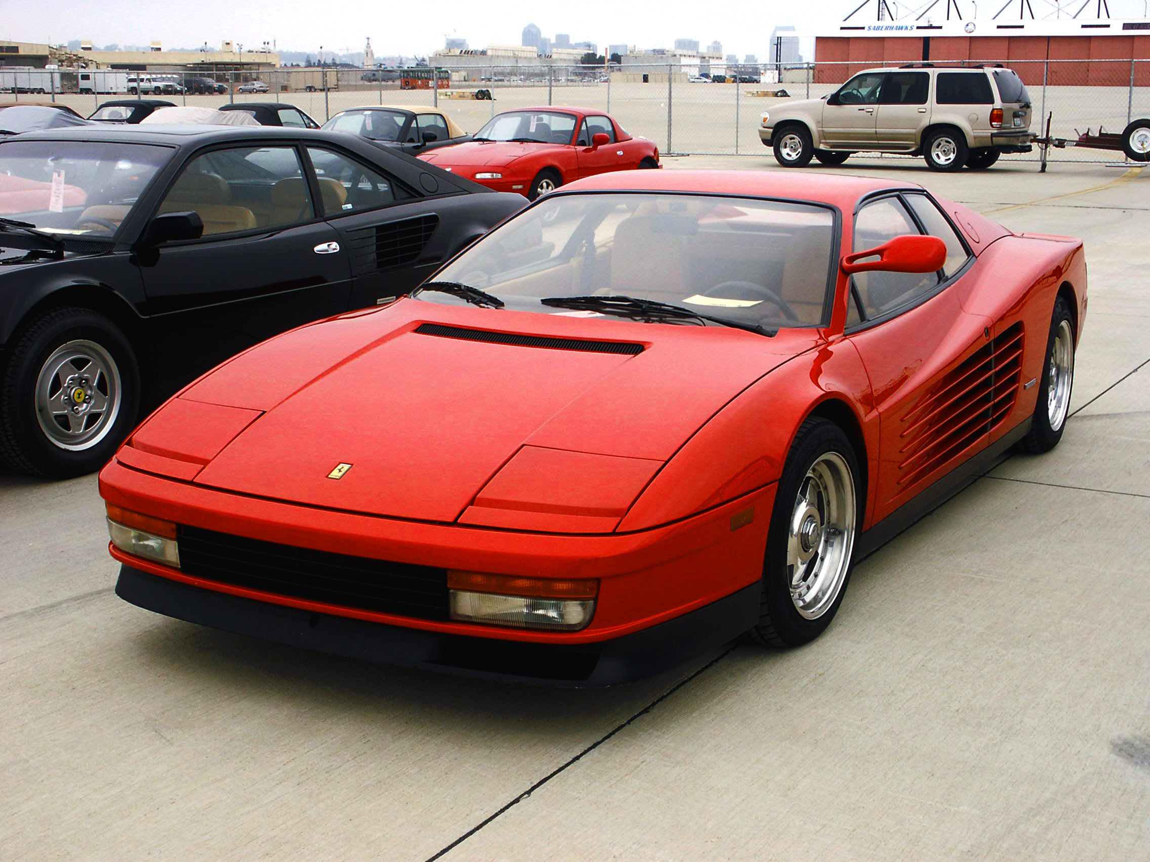 Ferrari Testarossa.